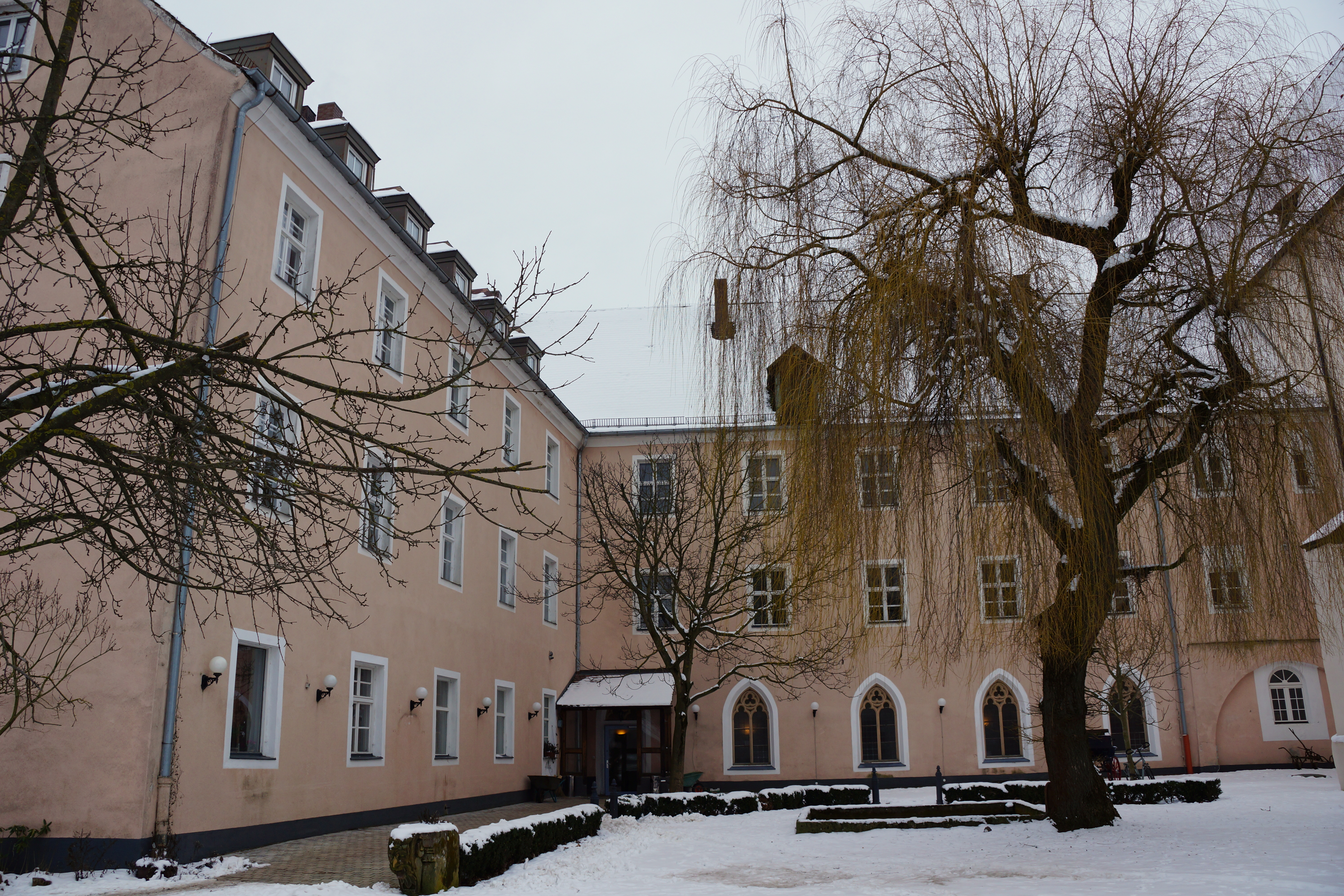 Kloster Seligenporten (Kreis Neumarkt in der Oberpfalz)